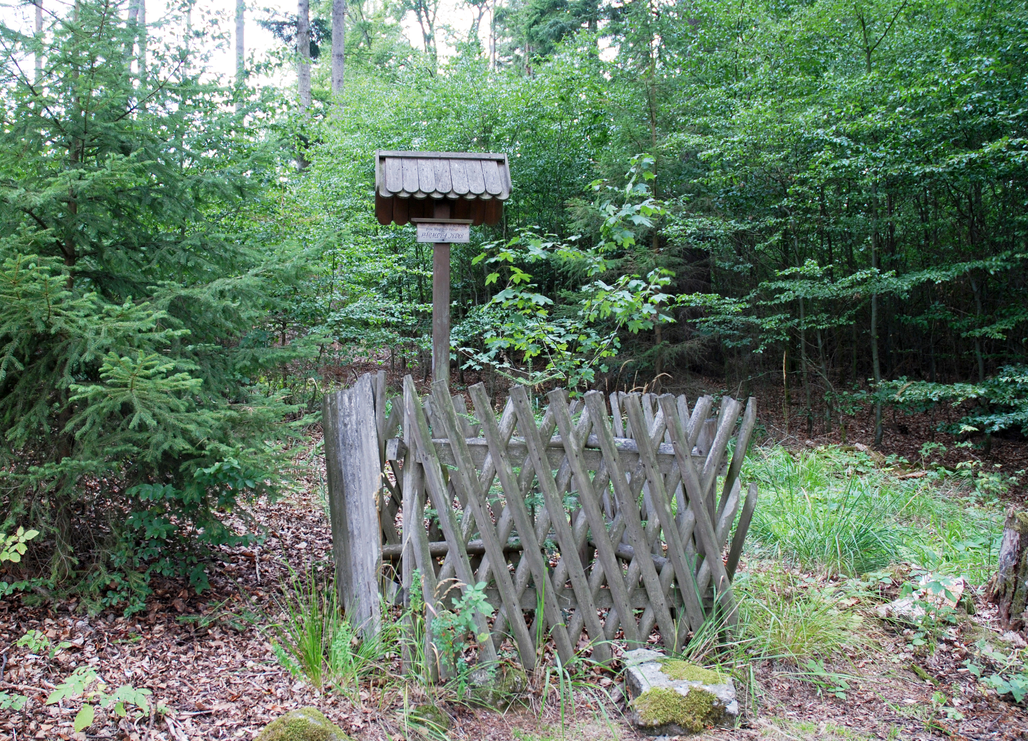 Páralova jedle v karlovarských lázeňských lesích poblíž Páralova sedátka a chaty Rusalka